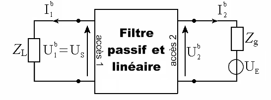 Schéma électrique explicatif.